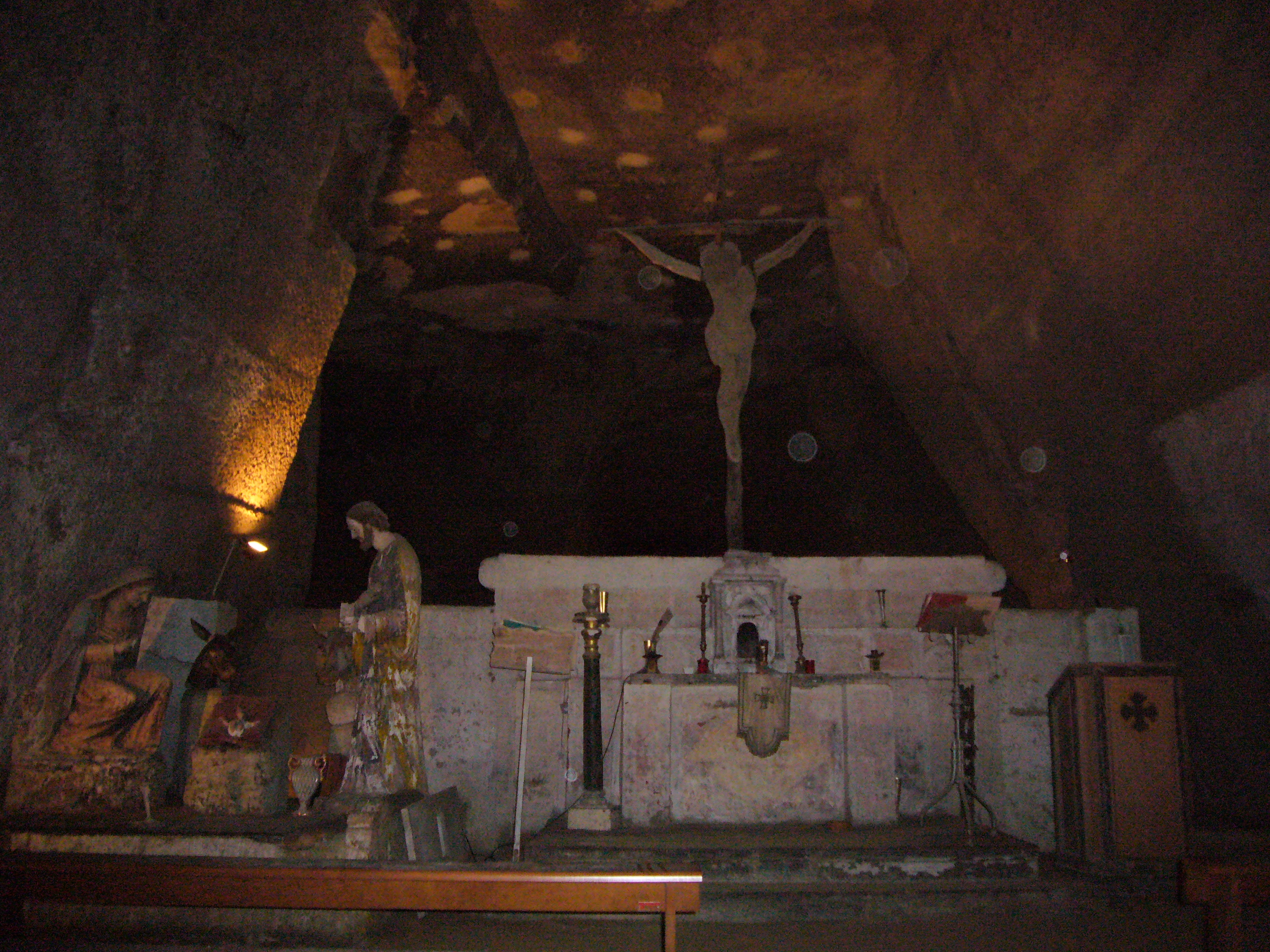 Napoli, Cimitero delle Fontanelle: la cappella col Presepe e il Crocifisso (dalla nascita alla morte)